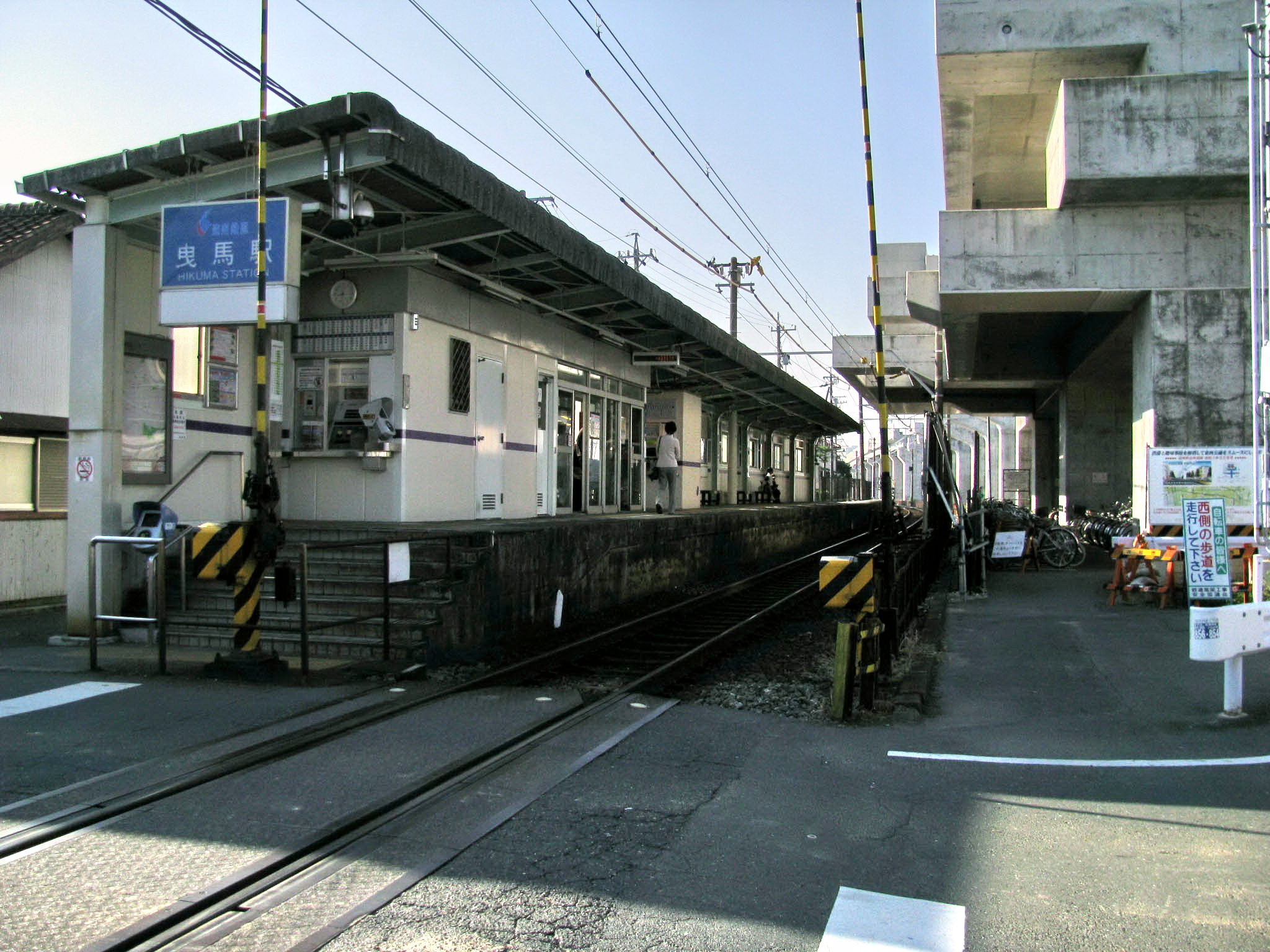 遠州鉄道曳馬駅